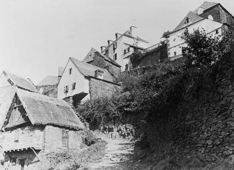 Imatge